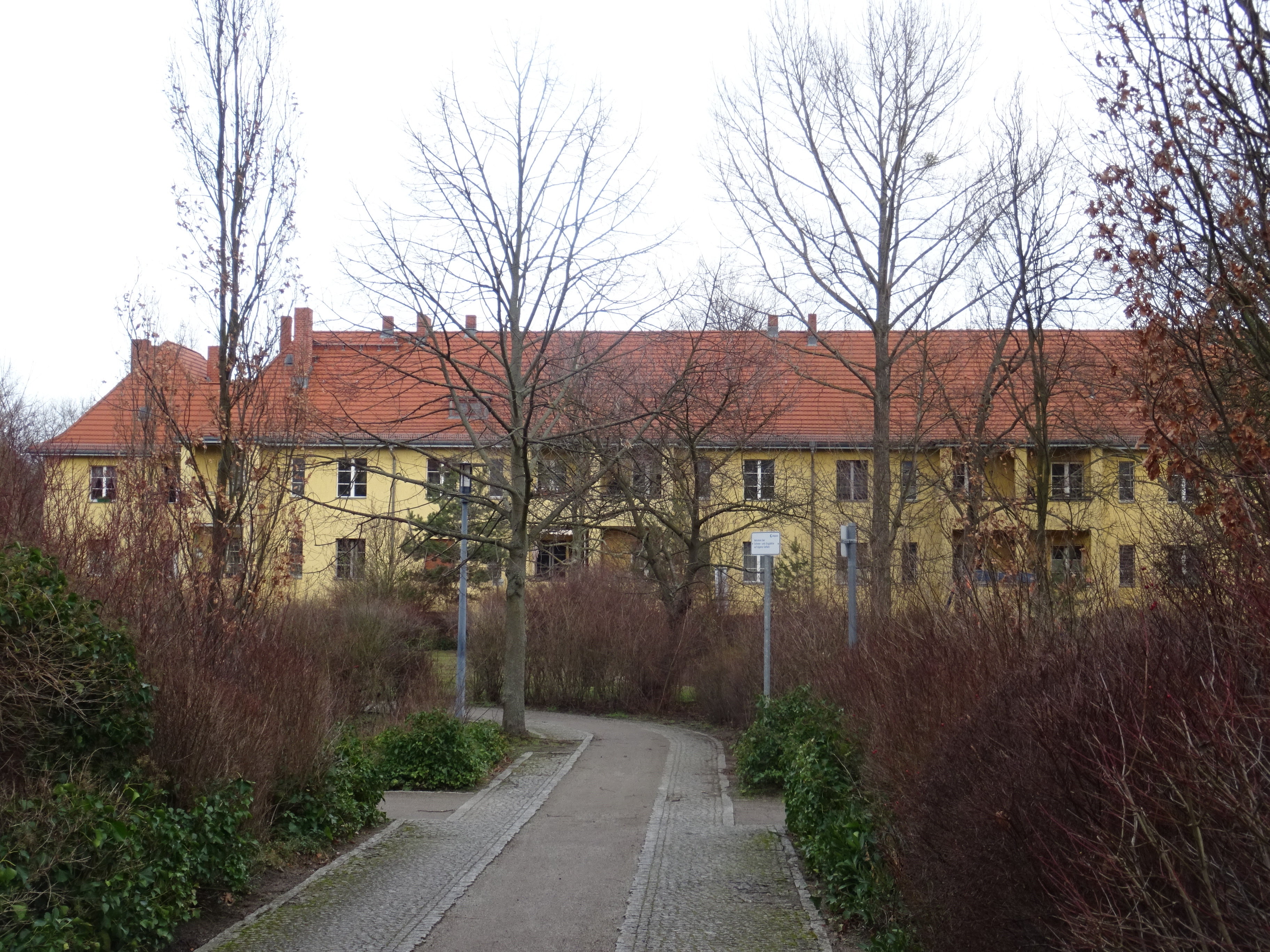 Berlin-Oberschöneweide, denkmalgeschützte GEBAG-Siedlung, Innenhof von der Zeppelinstraße aus gesehen